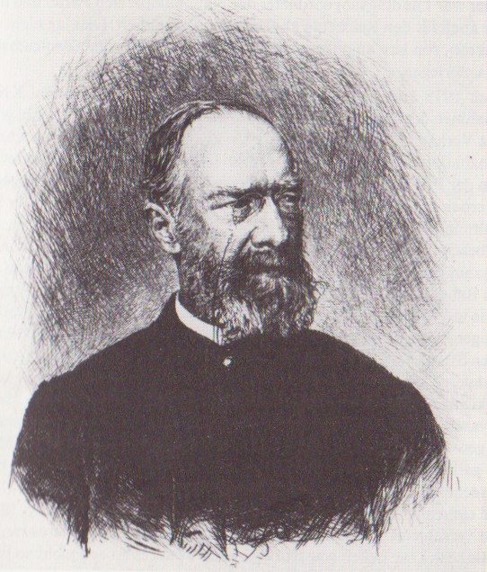 Provinzialdirektor von Rheinhessen Friedrich Küchler